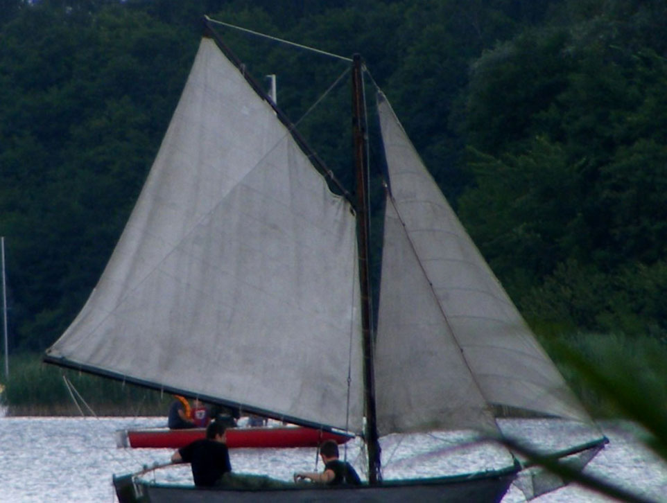 "Conserva" - kuter gaflowy, własność 25 WrŻDH im. HBS "Parasol" na obozie nad jez. lubikowskim w r.2008